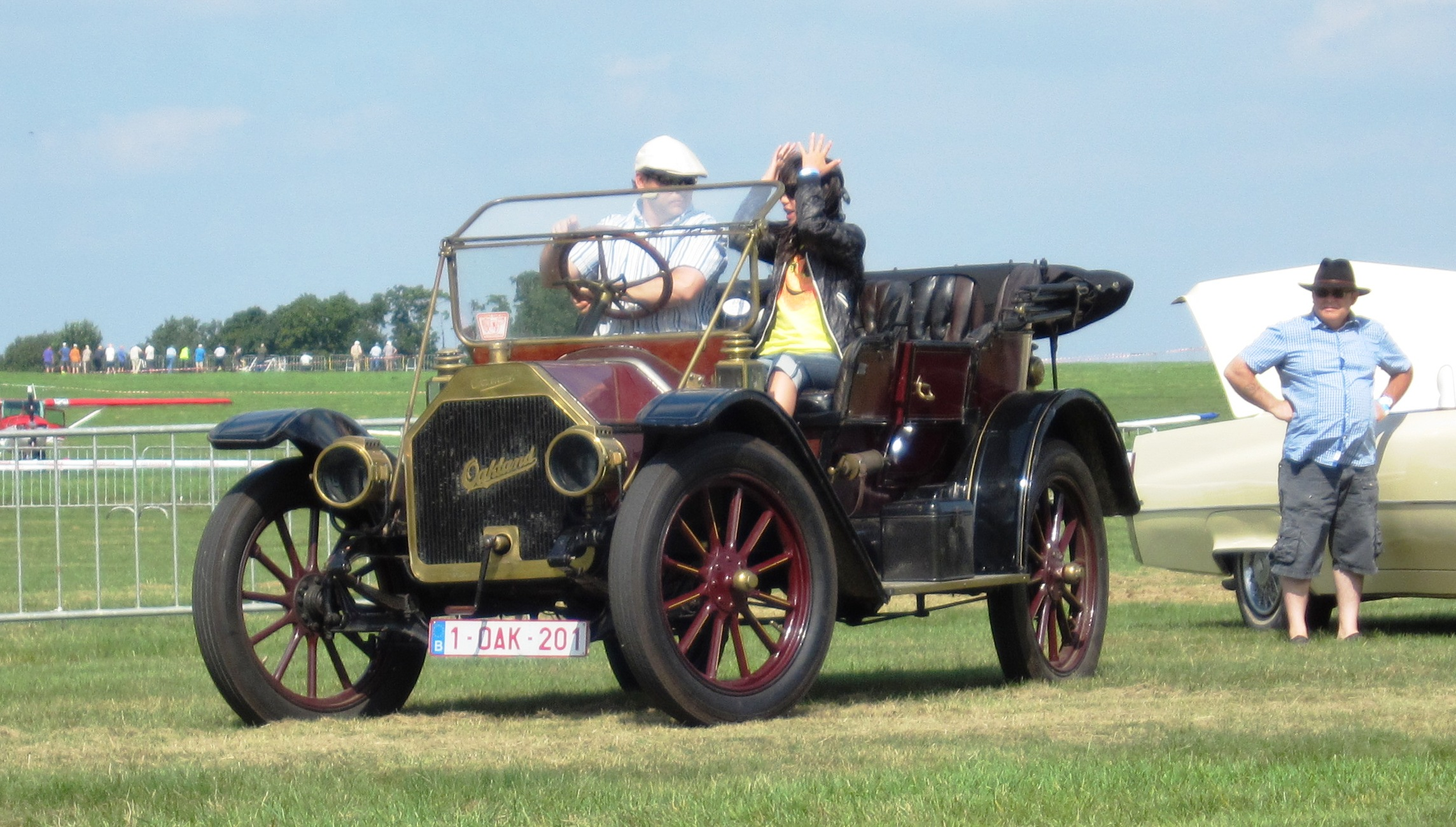 Oakland Forty (je pense...)